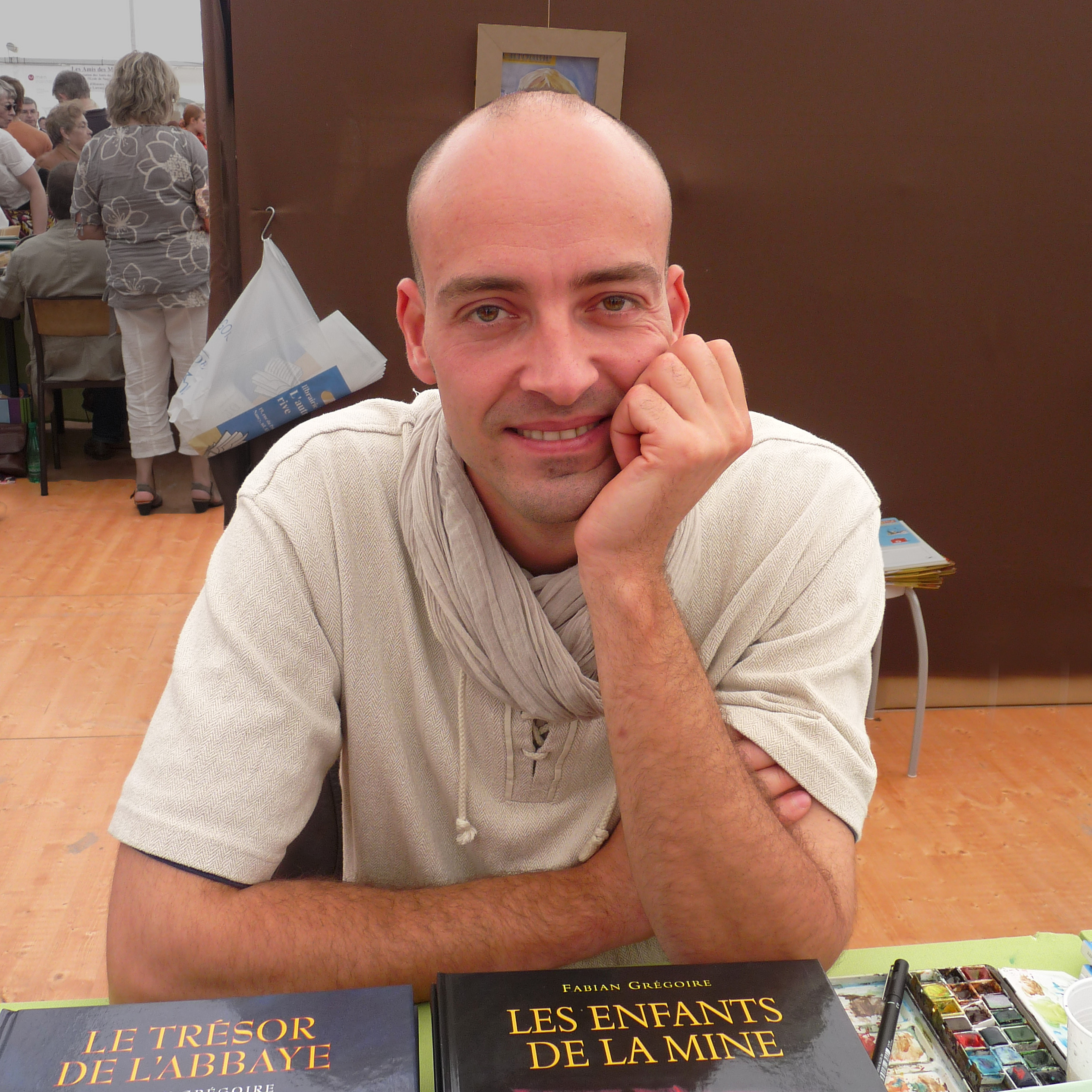 Fabian Grégoire en dédicace dans le cadre du "Livre sur la Place", Nancy, septembre 2011